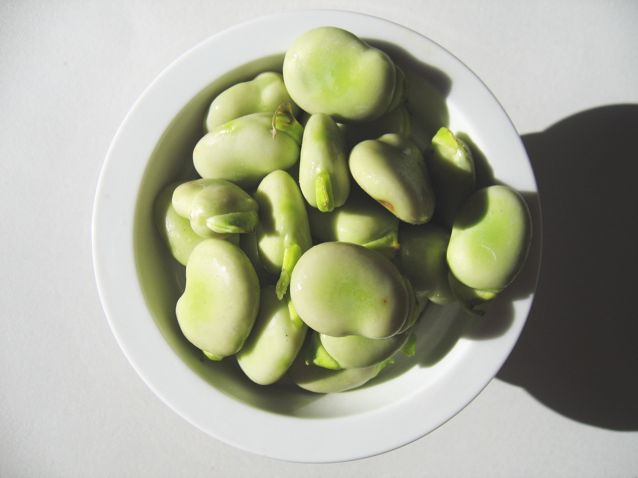 Vicia faba